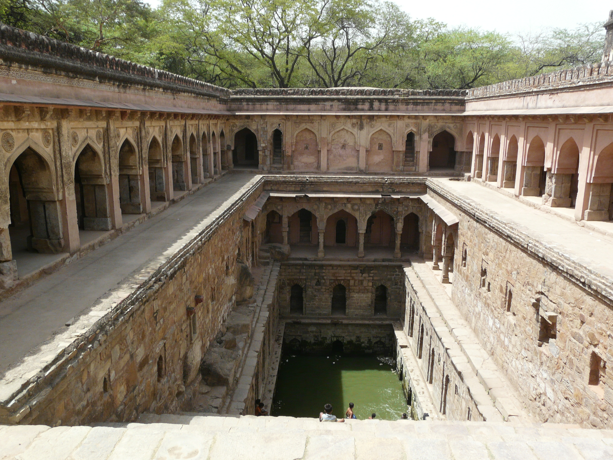 Rajon ki Baoli's baoli